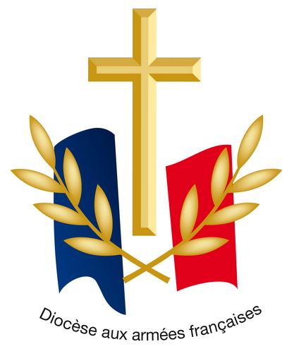 logo officiel du Diocèse aux armées françaises